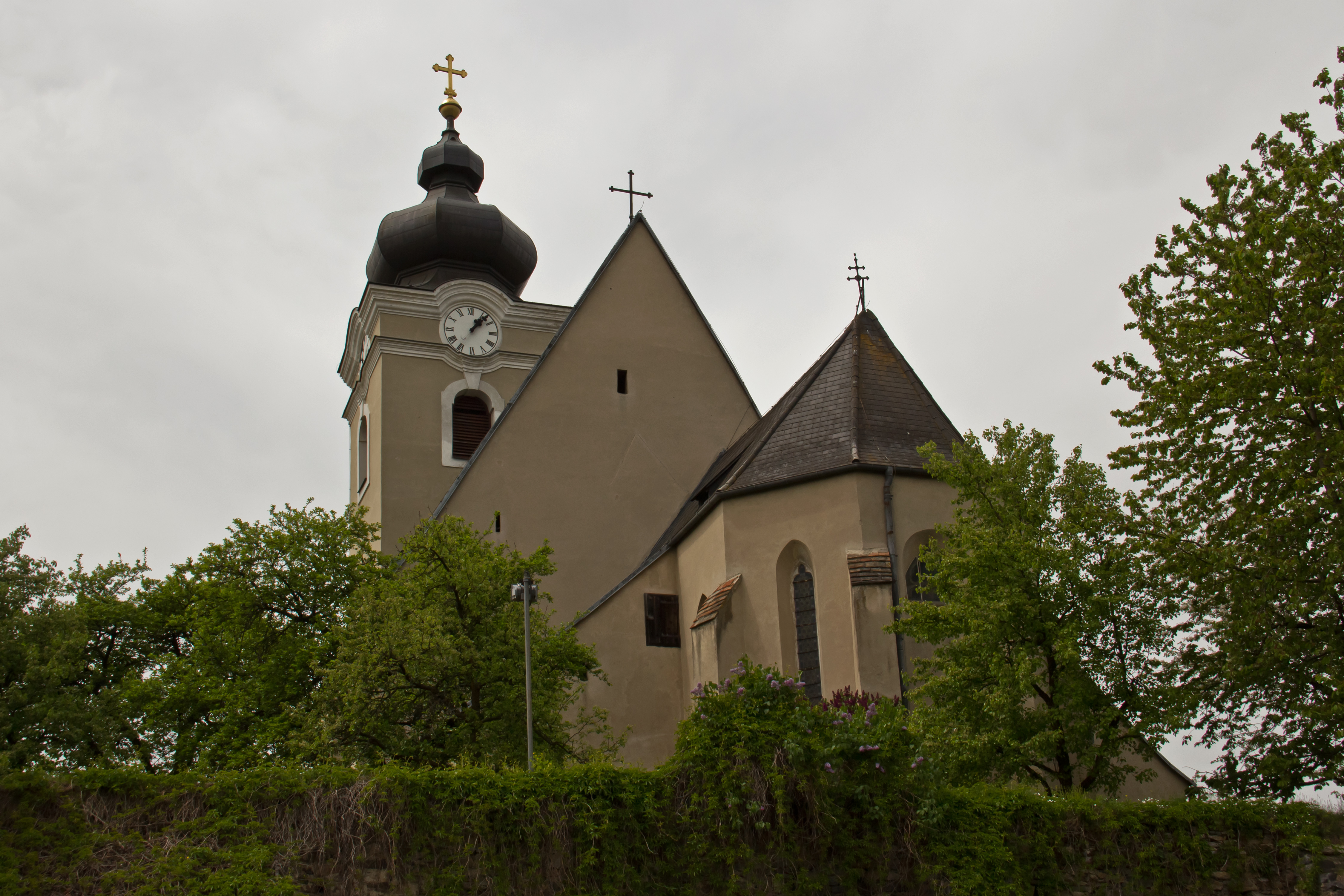 Gotische Kirche, in zwei Phasen unter Verwendung romanischer Teile errichtet. Chor und Unterbau des Turms aus der ersten Hälfte des 14. Jahrhunderts; Langhaus erstes Viertel des 16. Jahrhunderts. Barockes Turmobergeschoss. 1970 restauriert.